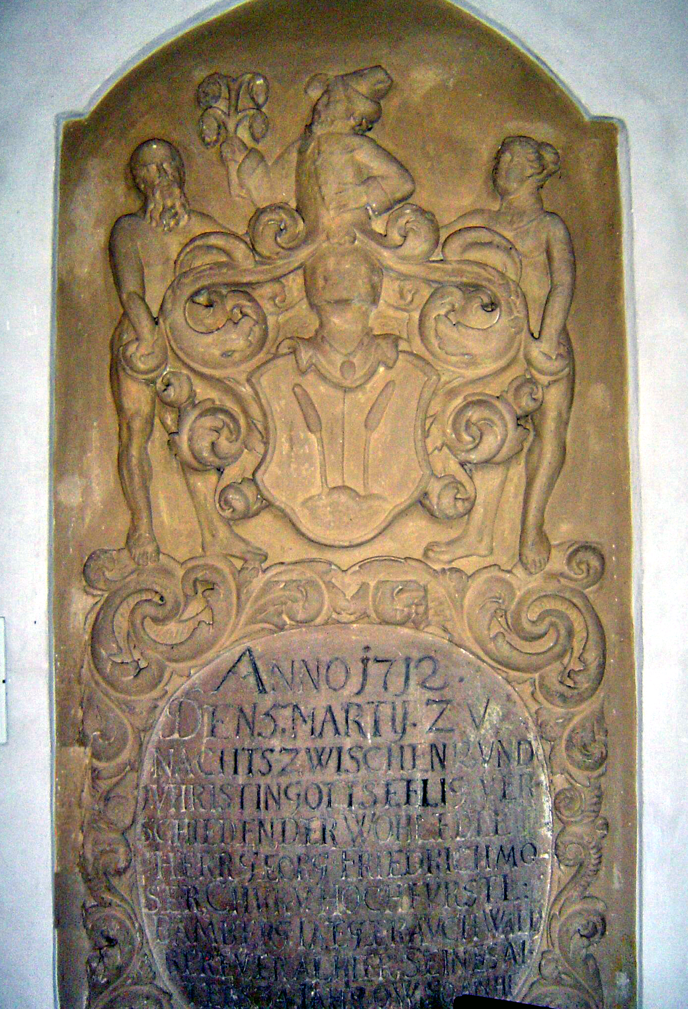 Die röm.-kath. Kirche „St. Maria“ im Ortsteil Volsbach, Gemeinde Ahorntal (alte Grabplatte von 1712)